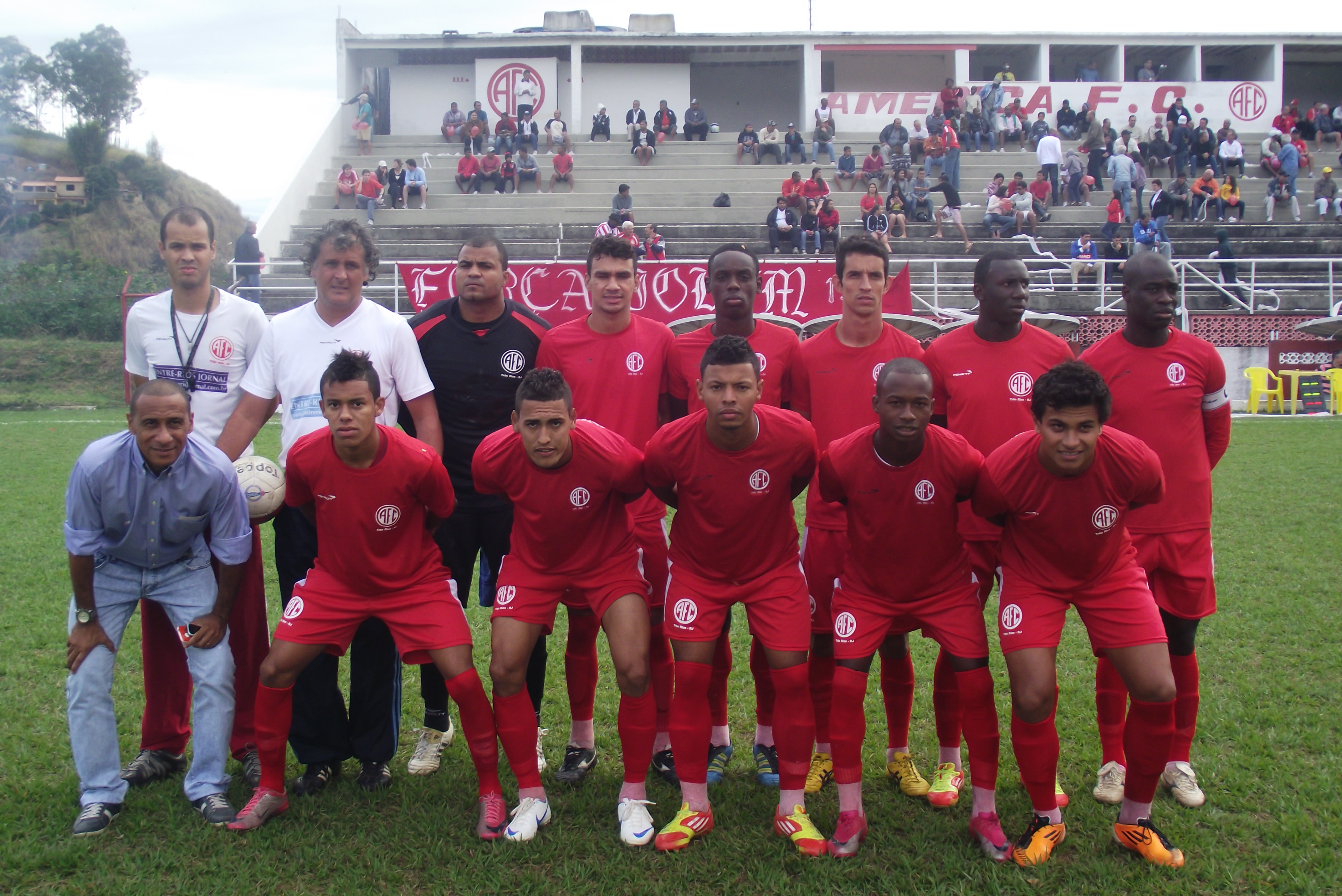 Equipe profissional do América de Três Rios em 2012.